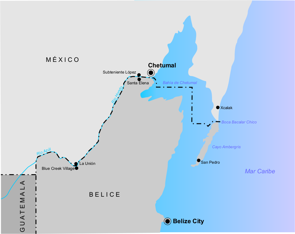 Mapa de la frontera entre México y Belice.